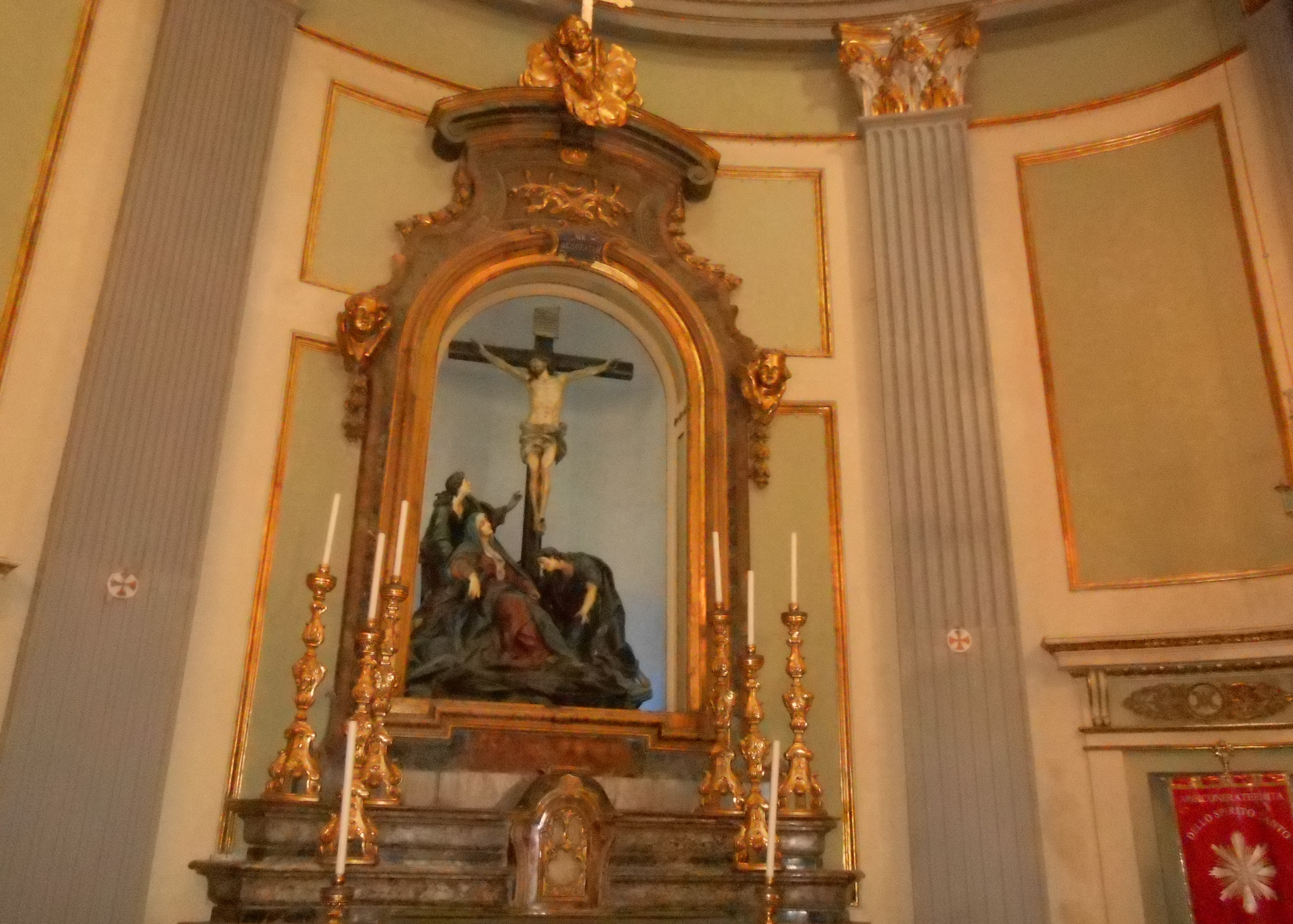 Gruppo dell'Addolorata nella chiesa del Santo Spirito a Torino